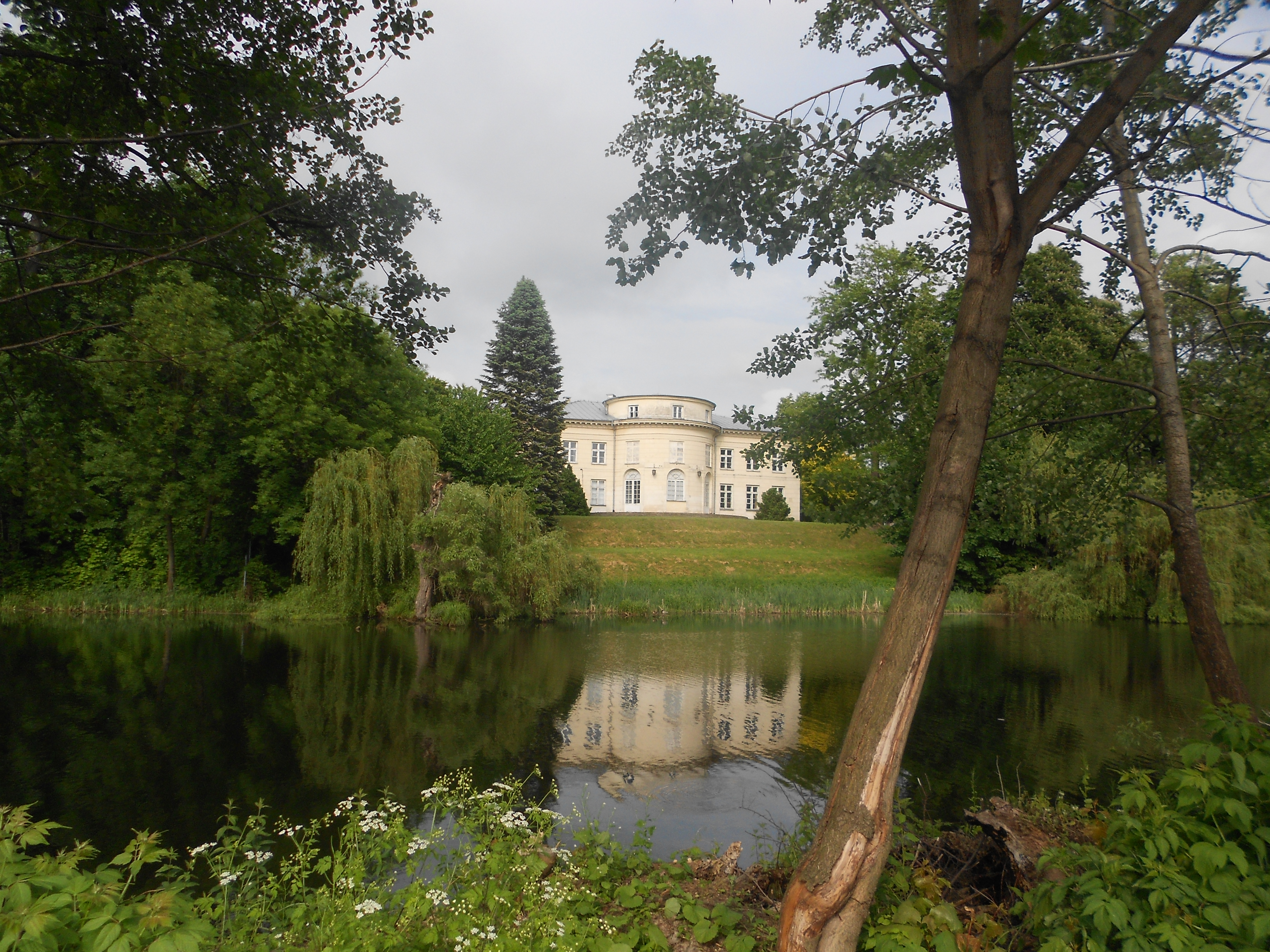 Puławy, pałac Marynki, 1791-1794